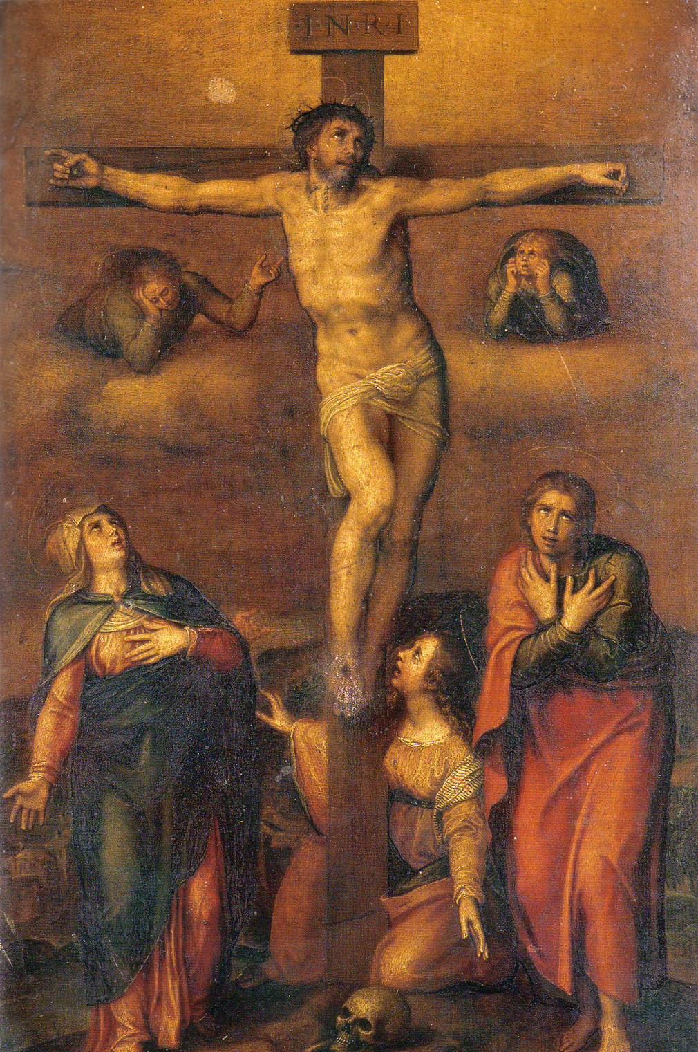 Copia desde la Crucifixion dibujada